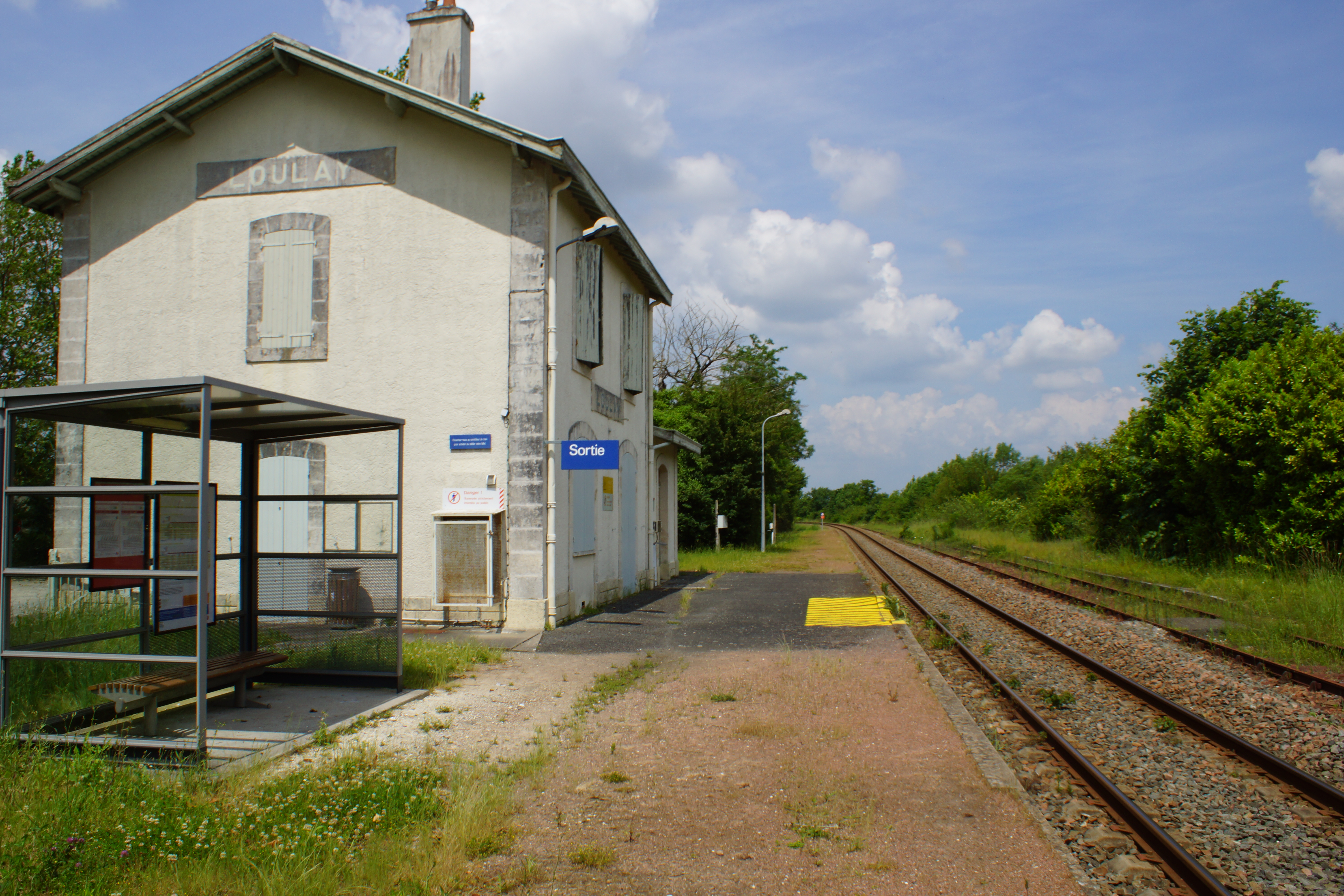 Gare de Loulay : vue de la halte en direction de Niort, avec la voie, le quai, l'abri de quai de la halte et l'ancien bâtiment voyageurs.